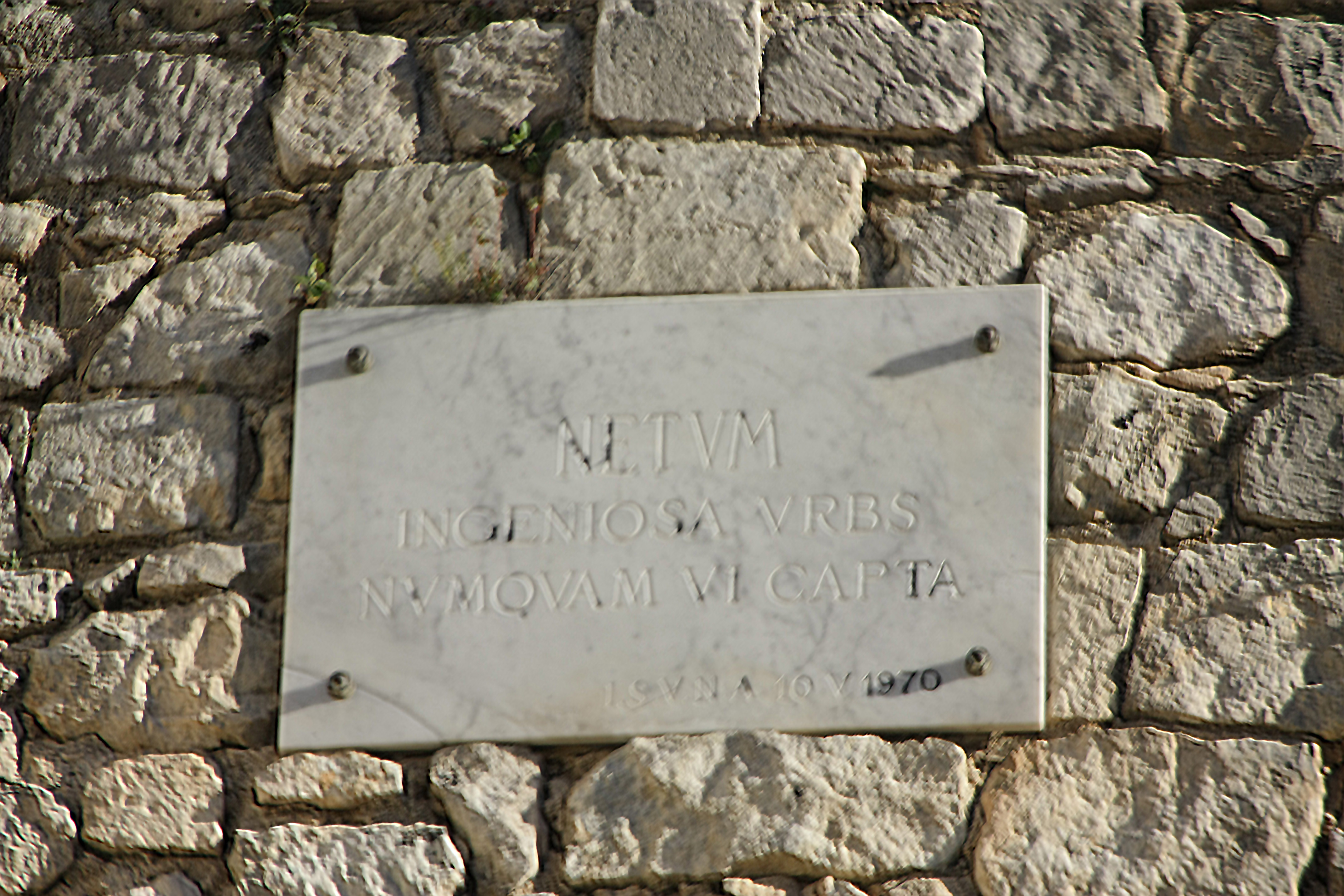 Iscrizione e motto di Noto Antica